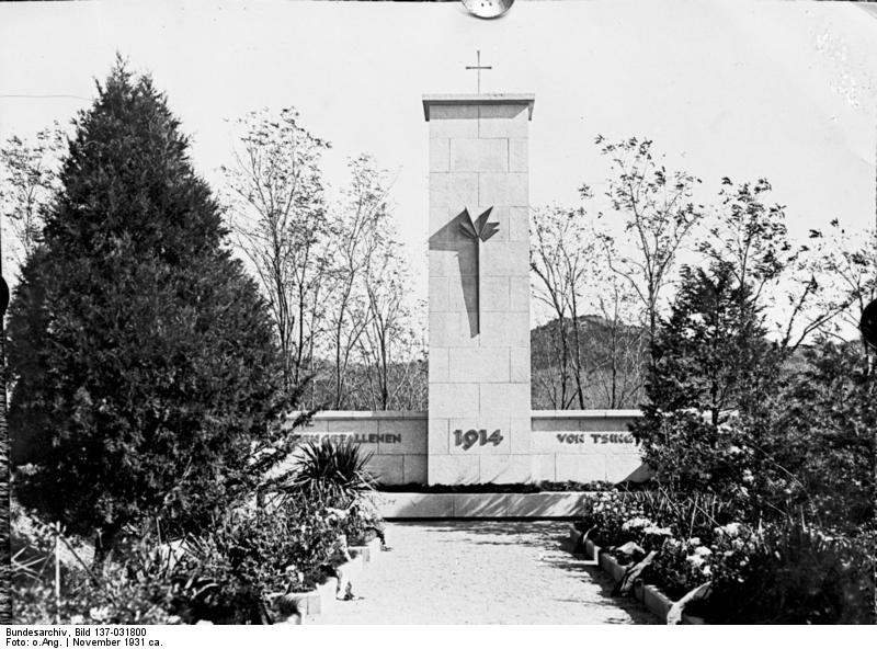 Tsingtau, Deutsches Gefallenendenkmal China, Tsingtau.- Deutsches Gefallenendenkmal in Tsingtau [Das Gefallenendenkmal in Tsingtau wurde am 7. November 1931 eingeweiht. Das einfache, klare und in seiner Bescheidenheit würdige Monument erinnert an die stolzen Worte, die der damalige Gouverneur des Pachtgebiets Kiautschou bei Kriegsausbruch an die Heim]